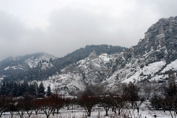 Αυτή η φωτογραφία τραβήχτηκε από την ανατολική πλευρά των Σερβίων τον Φλεβάρη του 2012. Στο χιονισμένο τοπίο μπορεί να δει κανείς αμιδρά τον Βυζαντινό καθεδρικό ναό του Αγ. Δημητρίου (12ος αιώνας).